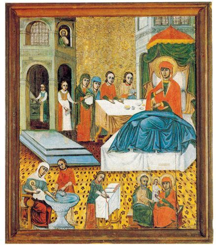 Нараджэнне Багародзiцы. Сярэдзiна ХVII ст. З в. Ляхаўцы Маларыцкага р-на. НММ РБ